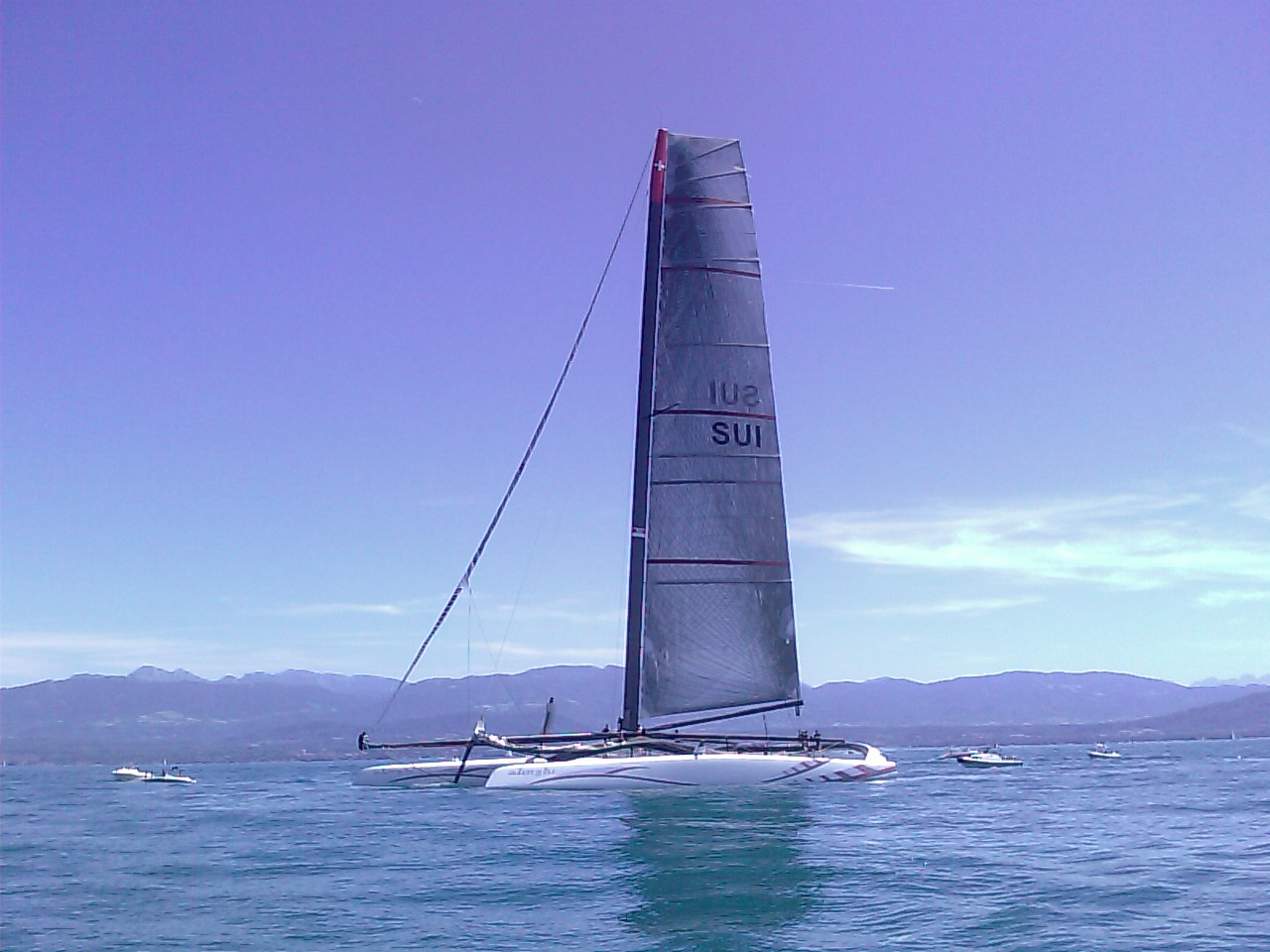 au large de Sciez